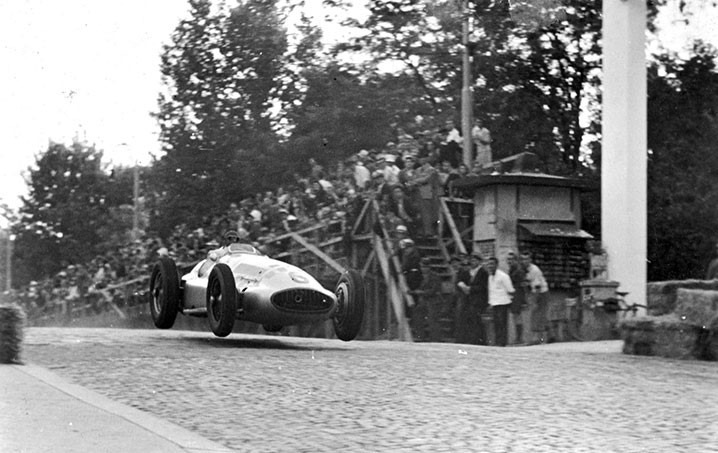 Preteča formule 1 na Kalemegdanu - Međunarodne automobilske i motociklističke trke održane 3. septembra 1939.